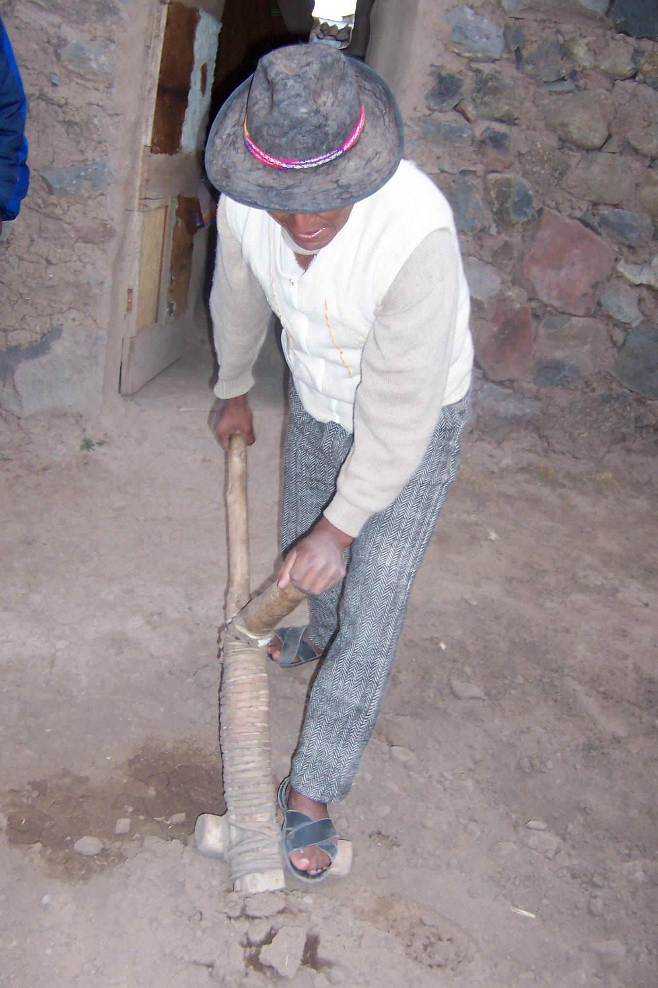 Hatuncolla, pueblo de población Quechua, a 34 km de Puno y a unos 3 km de Sillustani. Altiplano peruano. 3.850 m s.n.m. Campecino demostrando la utilización de la Chakitaglia, instrumento típico utilizado para la labranza de la tierra. Autor: Alfredobi Fecha: Agosto 2006